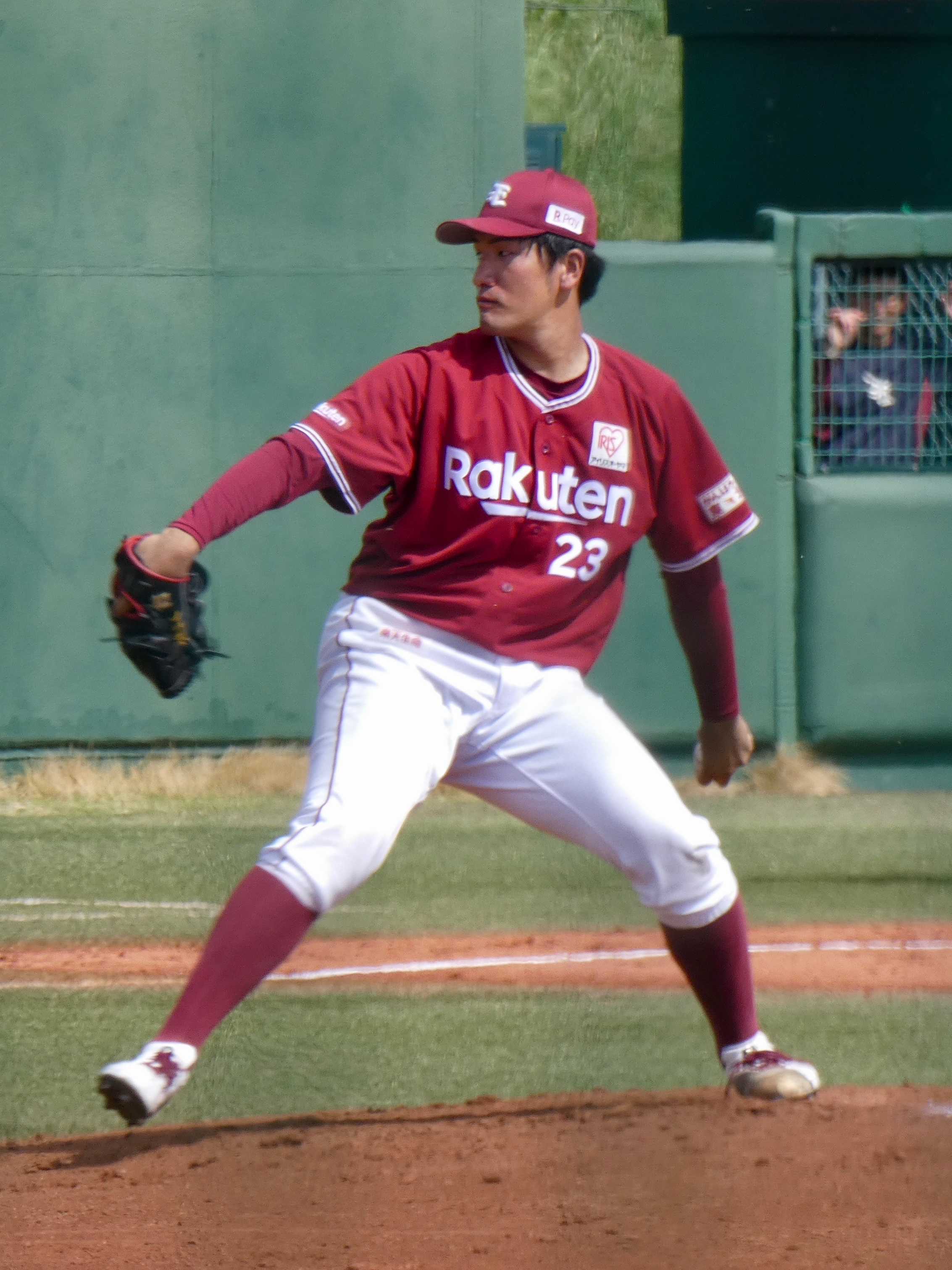 東北楽天ゴールデンイーグルスの選手「弓削隼人」。ヤクルト戸田球場にて。